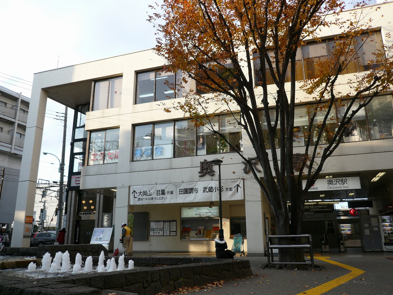 Okusawa Station, Tōkyū Meguro Line 東急目黒線 奥沢駅